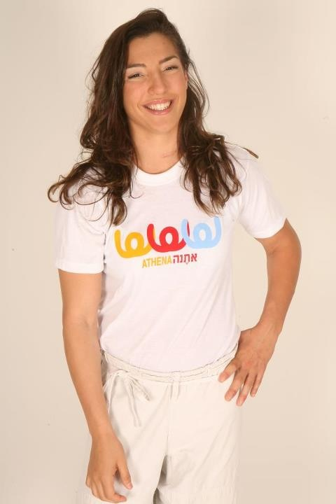 LIOR FOR ATHENA